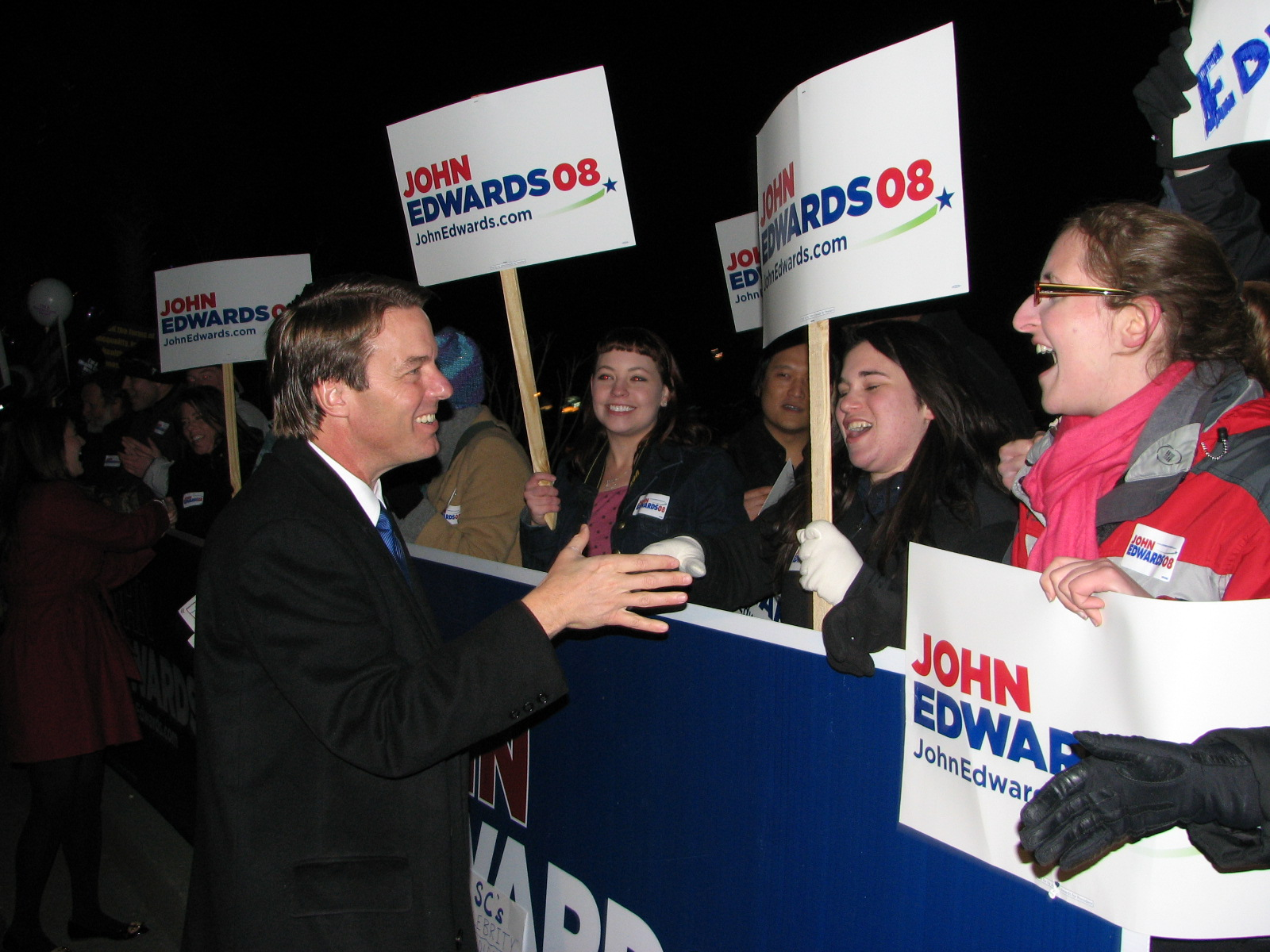 Debate 015